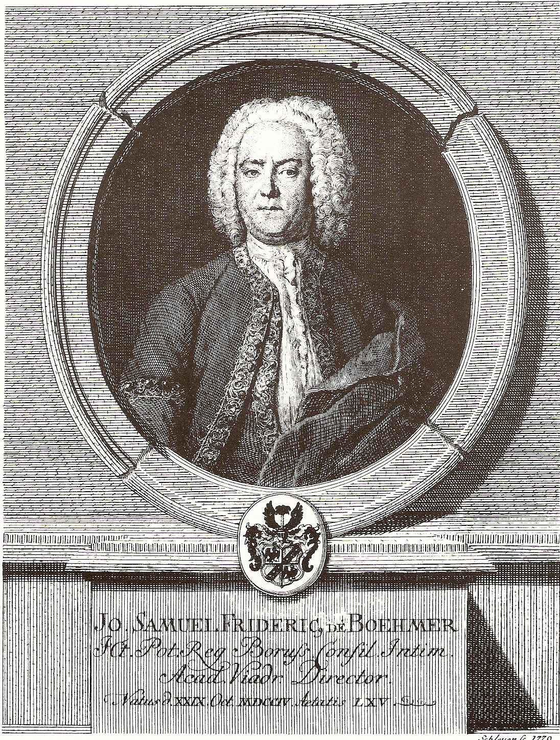 Portrait